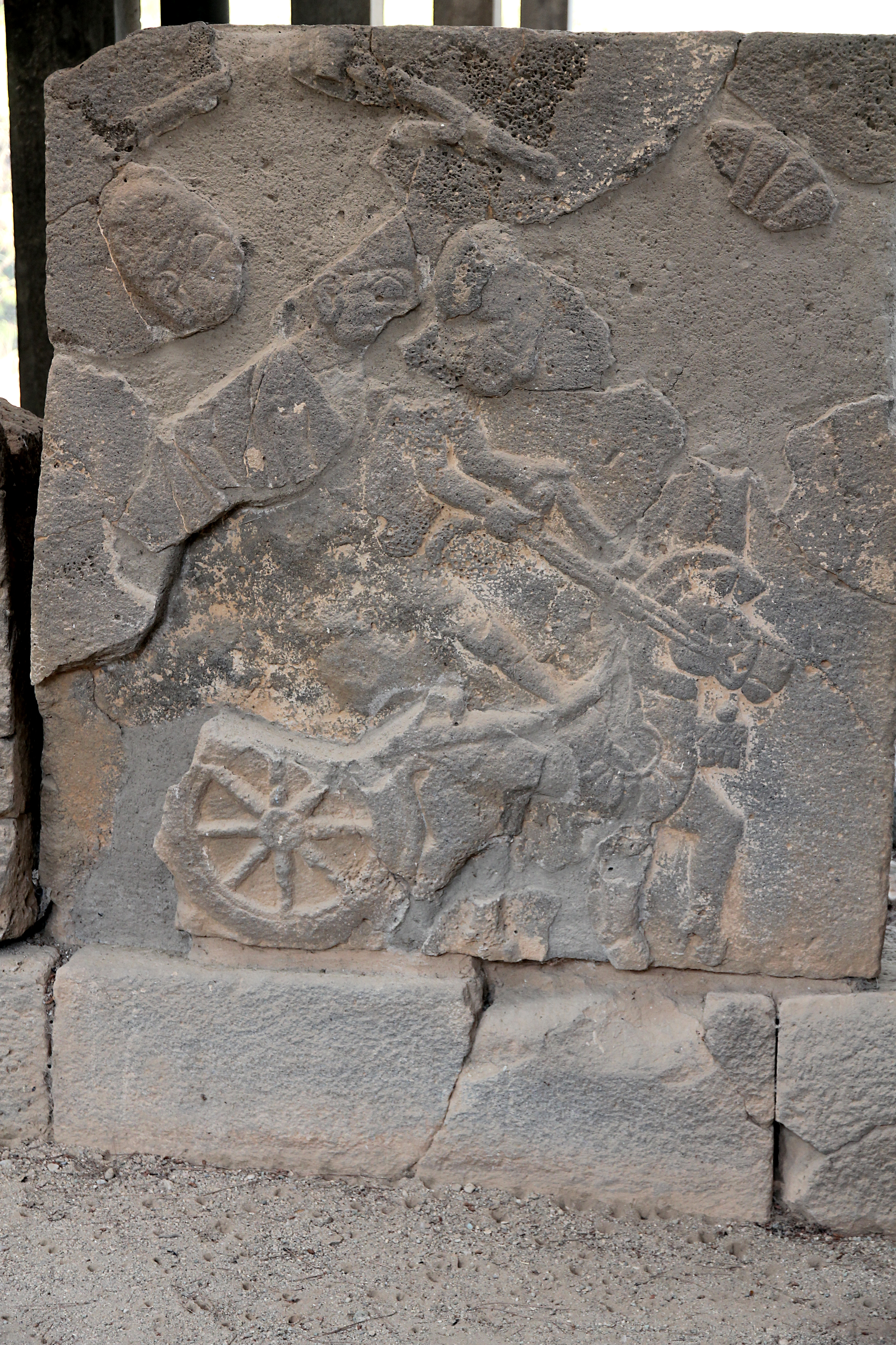 Karatepe (Asatiwataya), neo-hethitischer Fundort bei Osmaniye, Südtürkei, Nordtor, linke Kammer, Relief NKl 2